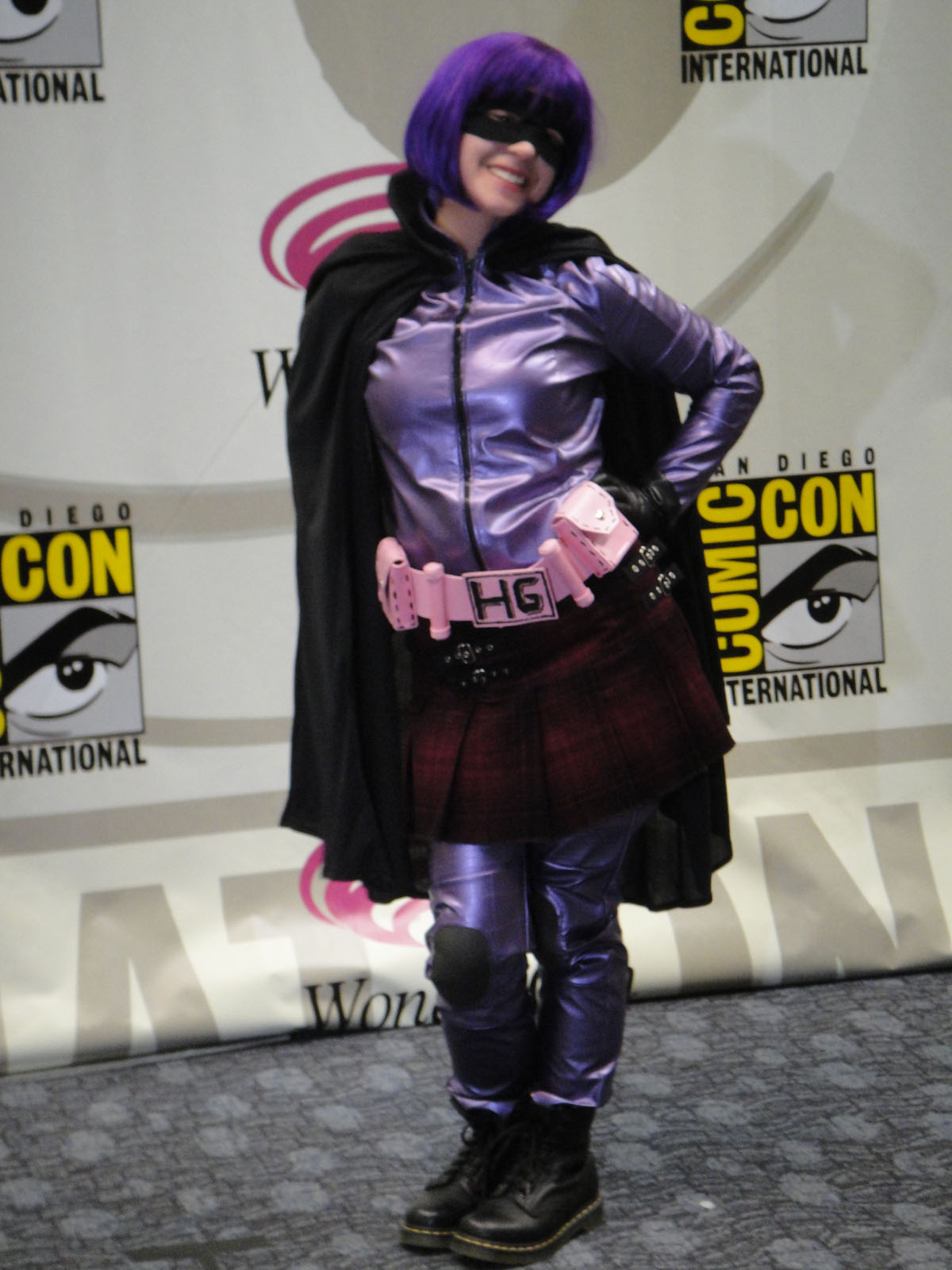 WonderCon 2011 Masquerade - Hit Girl